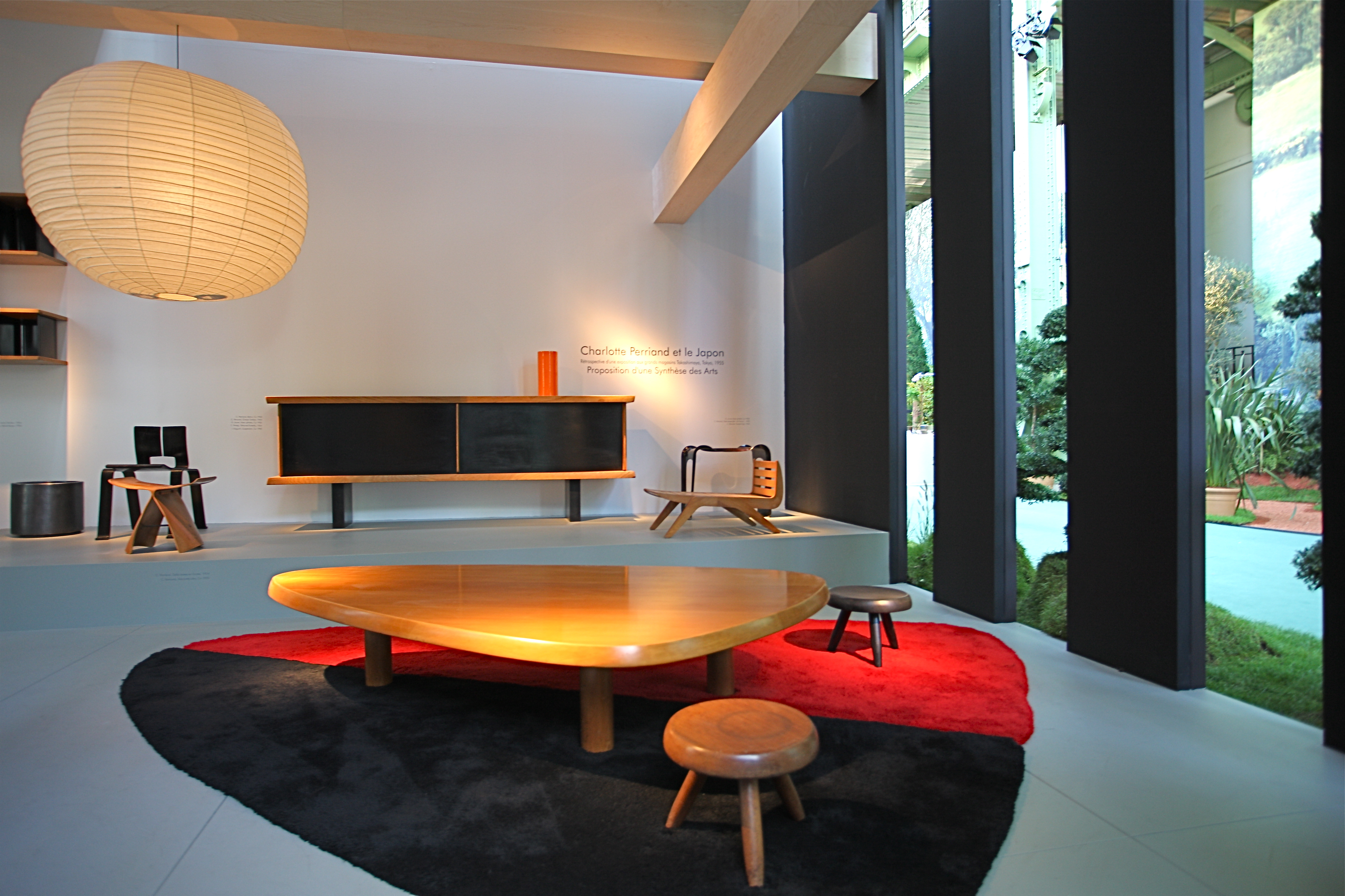 Charlotte Perriand (Française, 1903-1999): table et chaises, Grand Palais, 2008